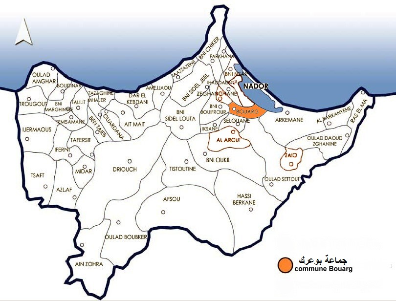 جماعة بوعرك commune Bouarg